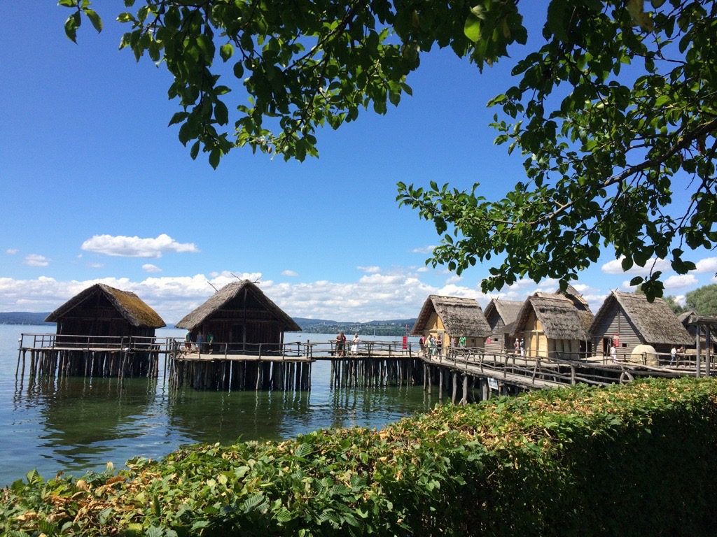 Pfahlmuseum Unteruhldingen.